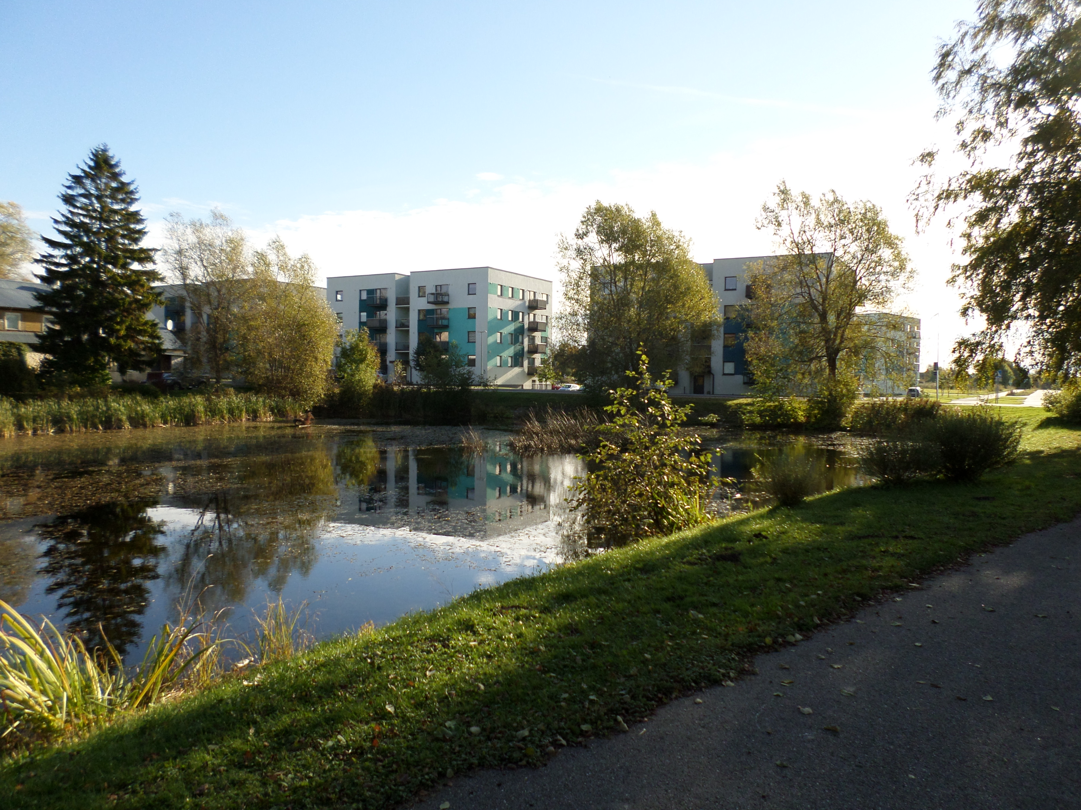 Lehmja mõisa tiik.